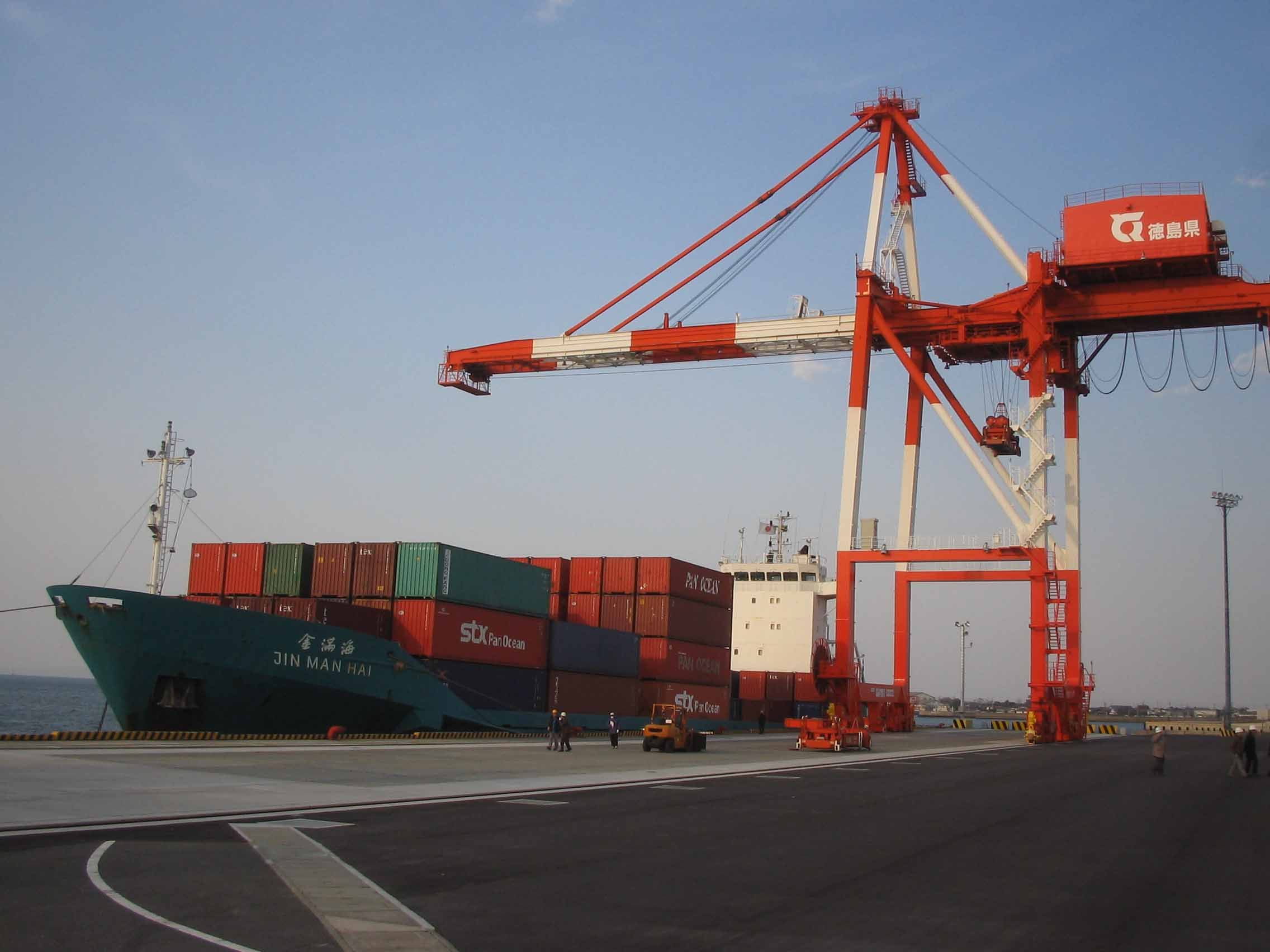 徳島小松島港コンテナターミナルに寄港中のJIN MAN HAIのコンテナ積卸作業